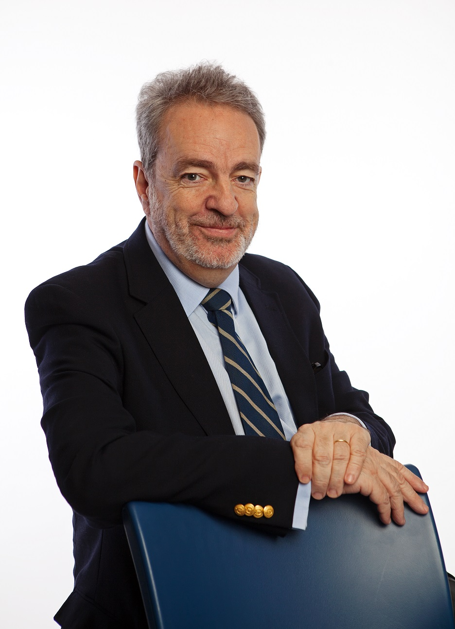 Gerolf Annemans.